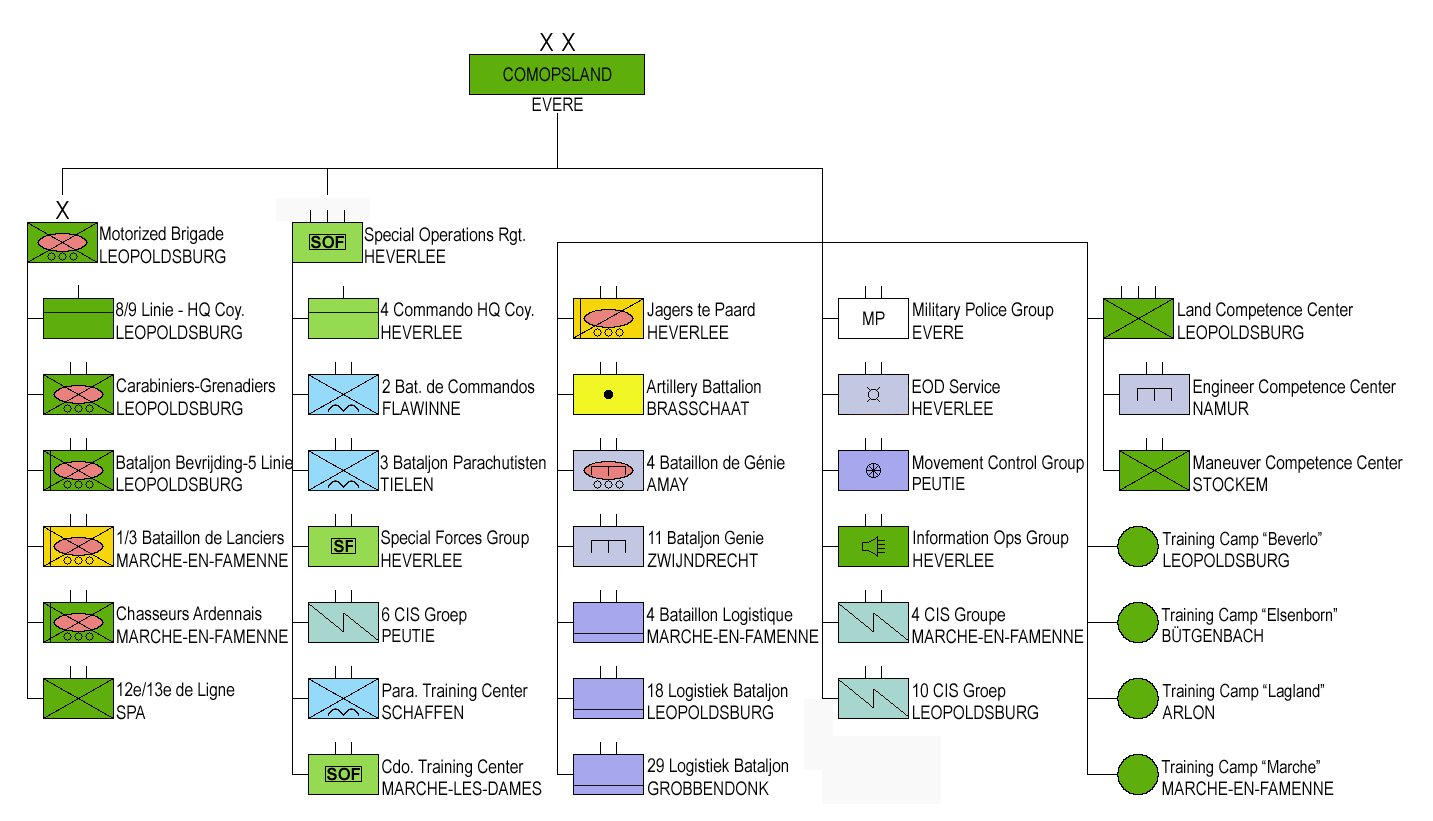 De Landcomponent schematisch voorgesteld